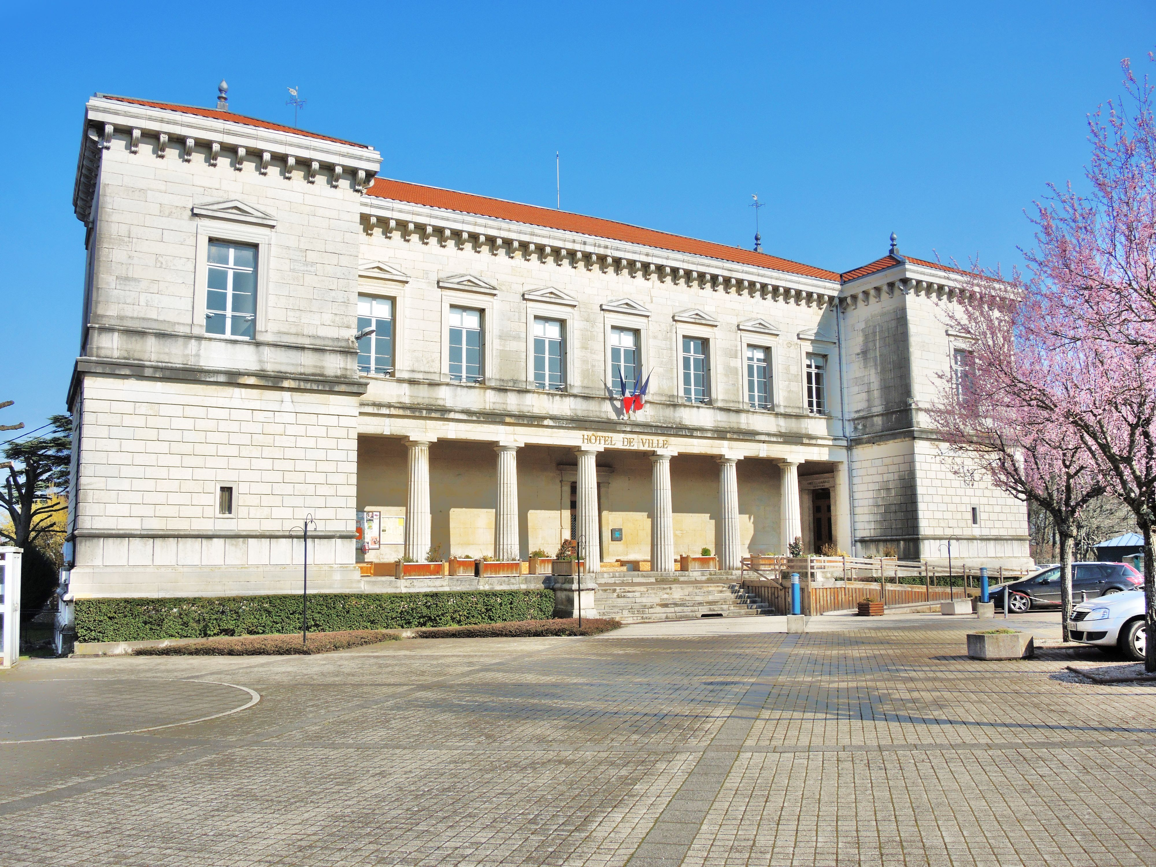 Mairie de Gy.